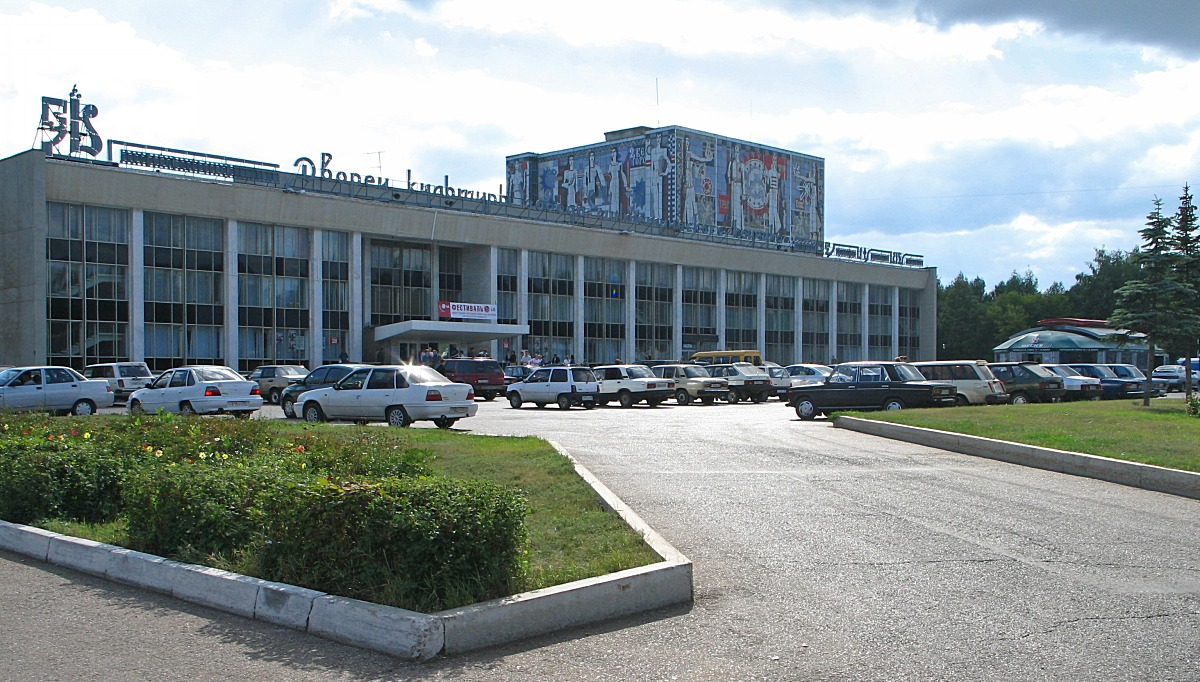 Дворец культуры ОАО «Каучук» (крупнейший в городе)